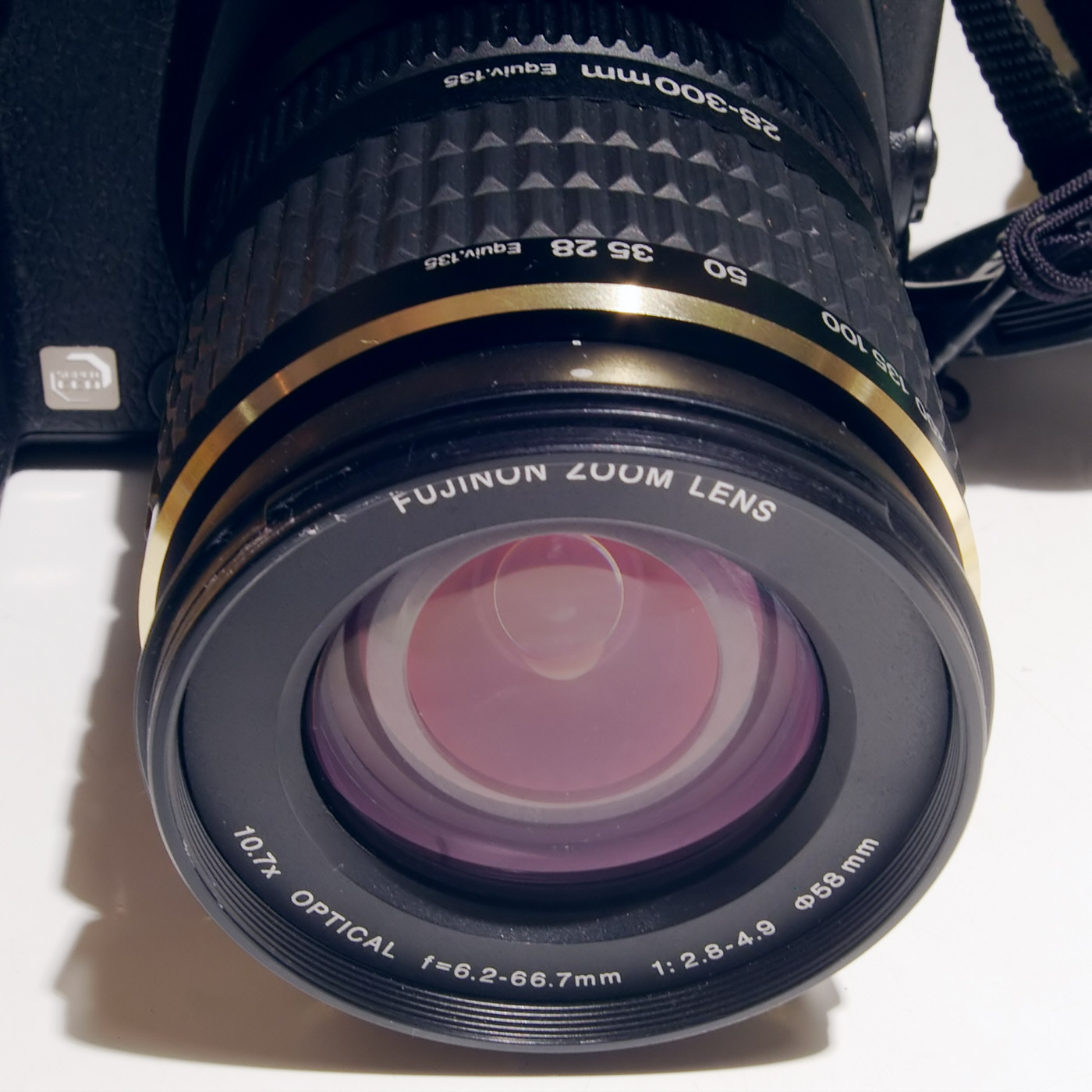 Objektiv einer Digitalkamera mit zwei Angaben für die Brennweite: Tatsächliche Brennweite vorn unten, zusätzliche Angabe für die kleinbildäquivalente Brennweite ("Equiv. 135") auf dem Zoomring